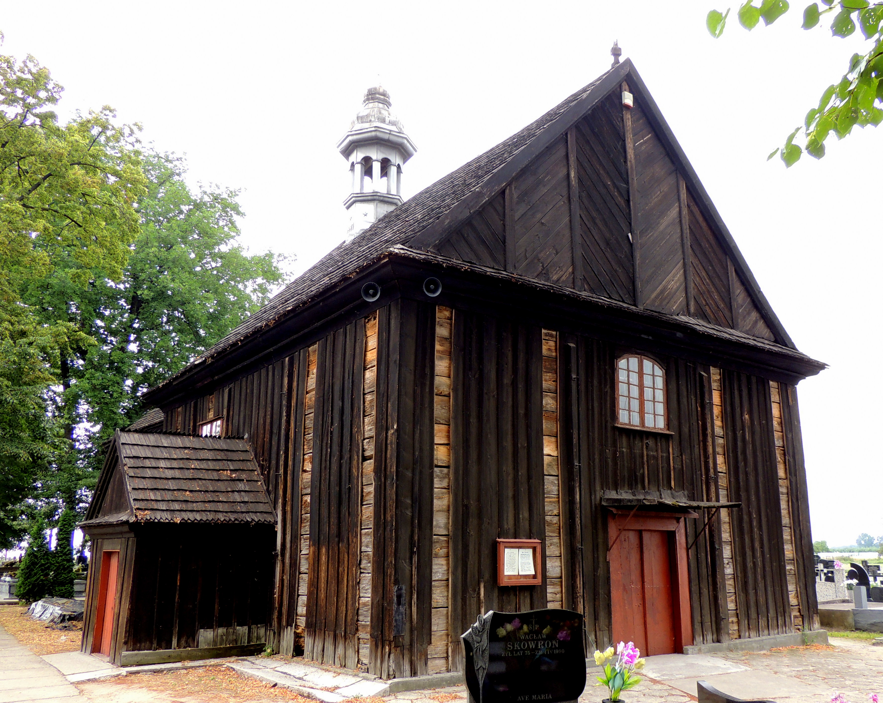 Piątek - kościół cmentarny p.w. św. Wawrzyńca, poł. XVIII